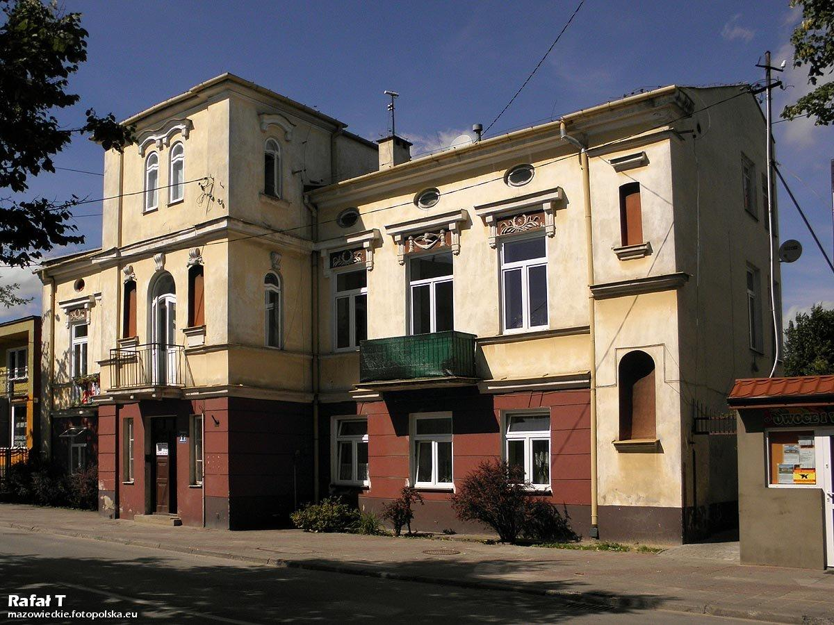 Budynek przy ul.Piłsudskiego 11.